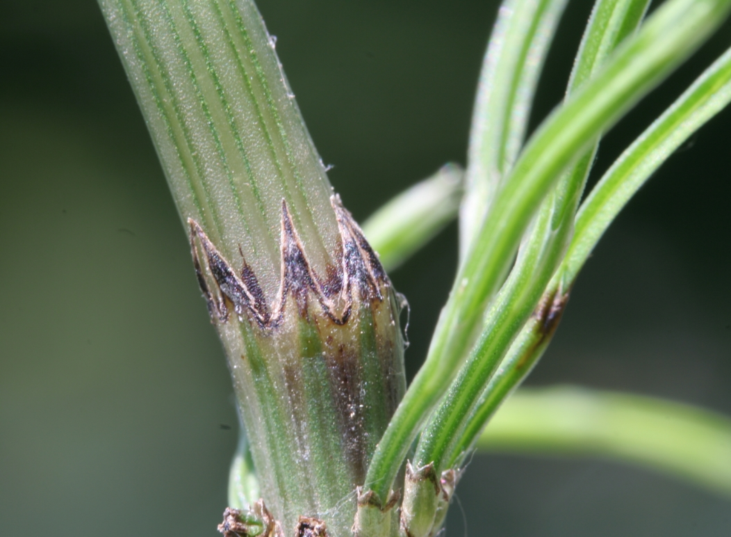 Equisetum_arvense (Equiseto dei campi) Località : Villa Prima, Limana (BL), 350 m s.l.m.